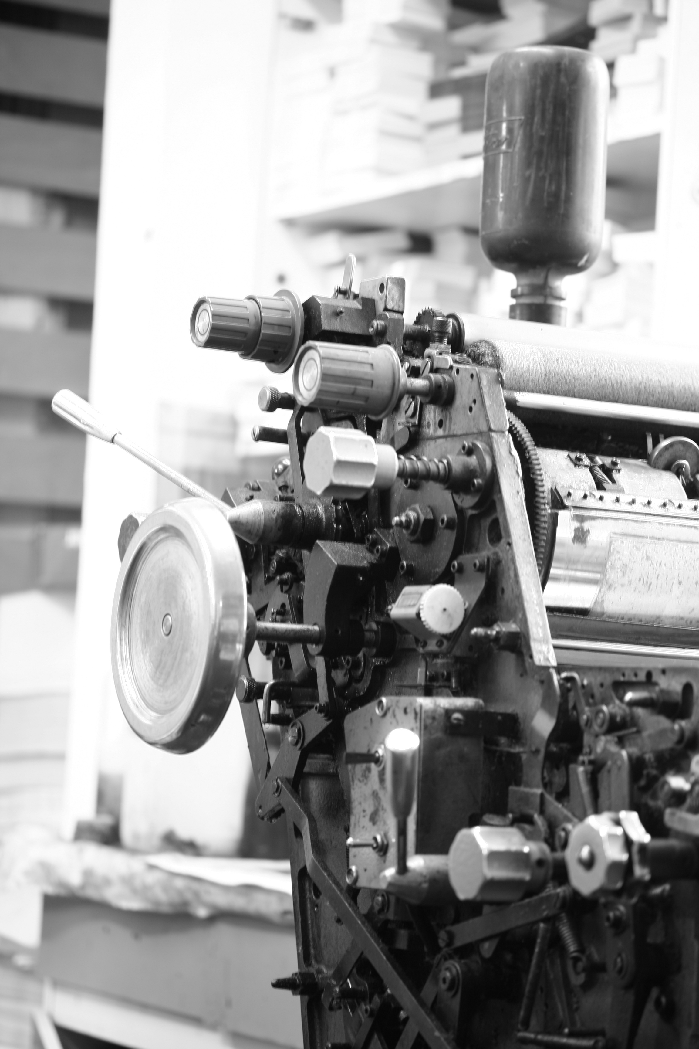 A4 Size Gestetner Offset Printing Machine.